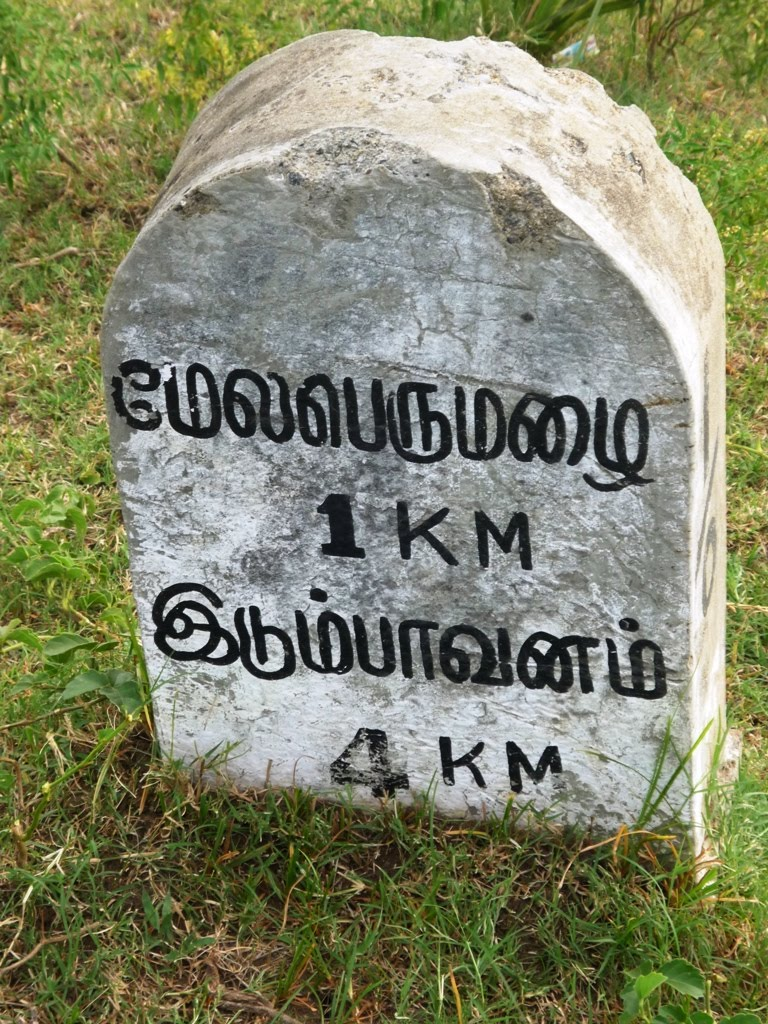 மேலைப்பெருமழை எல்லை கல்